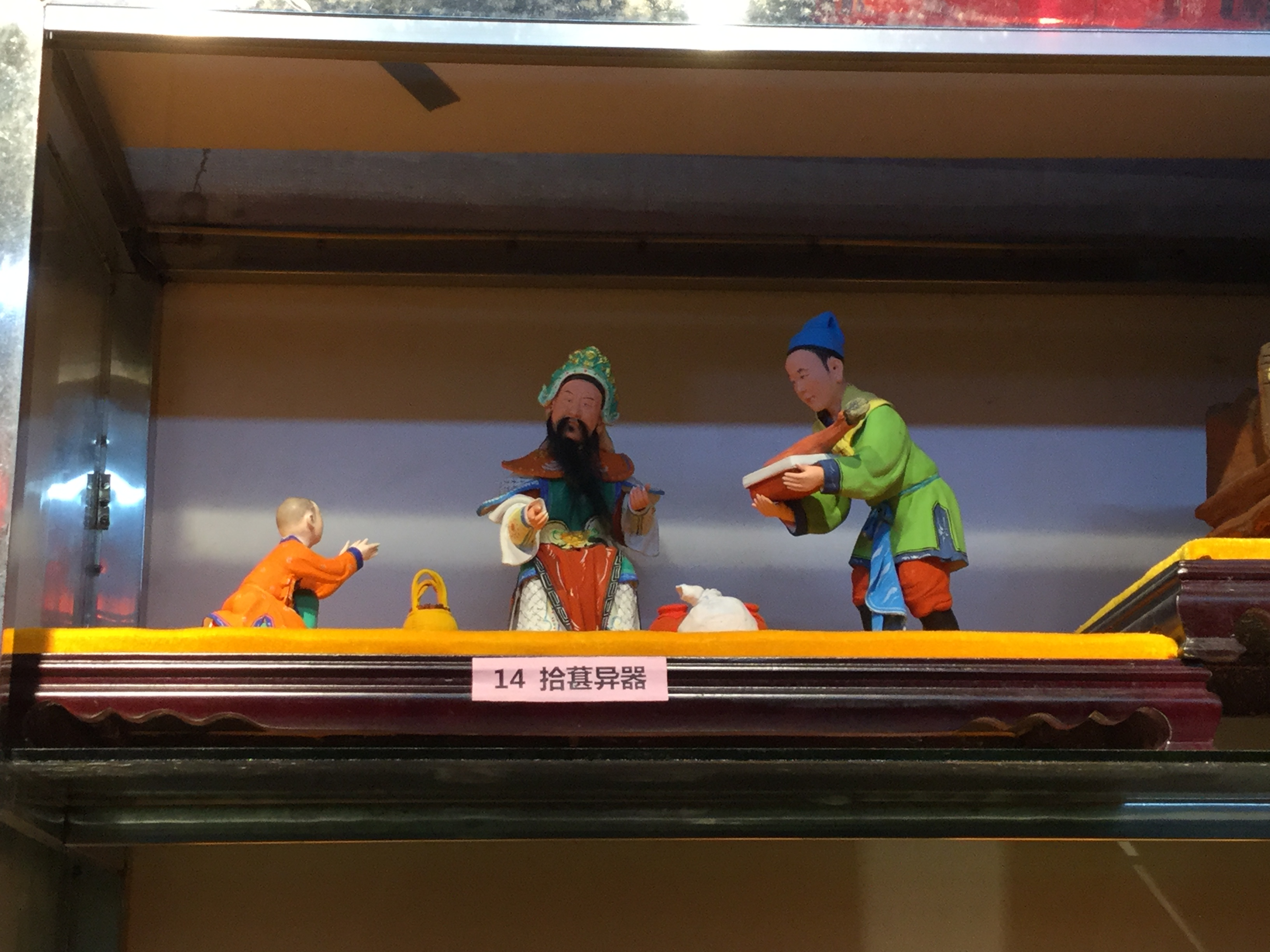 翁仔灯《拾葚异器》，摄于2018年3月2日。